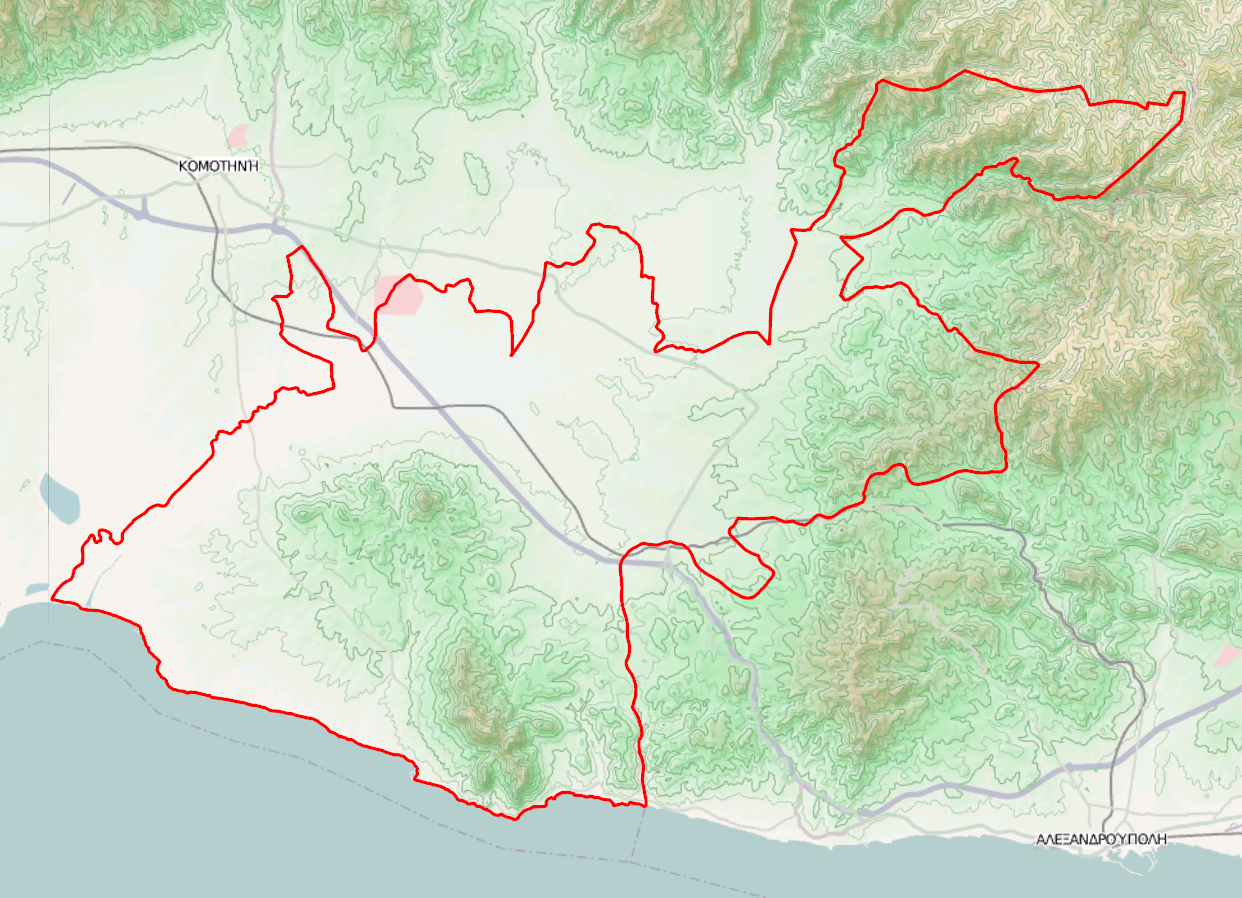 Τοπογραφικός χάρτης του Δήμου Μαρώνειας-Σαπών.